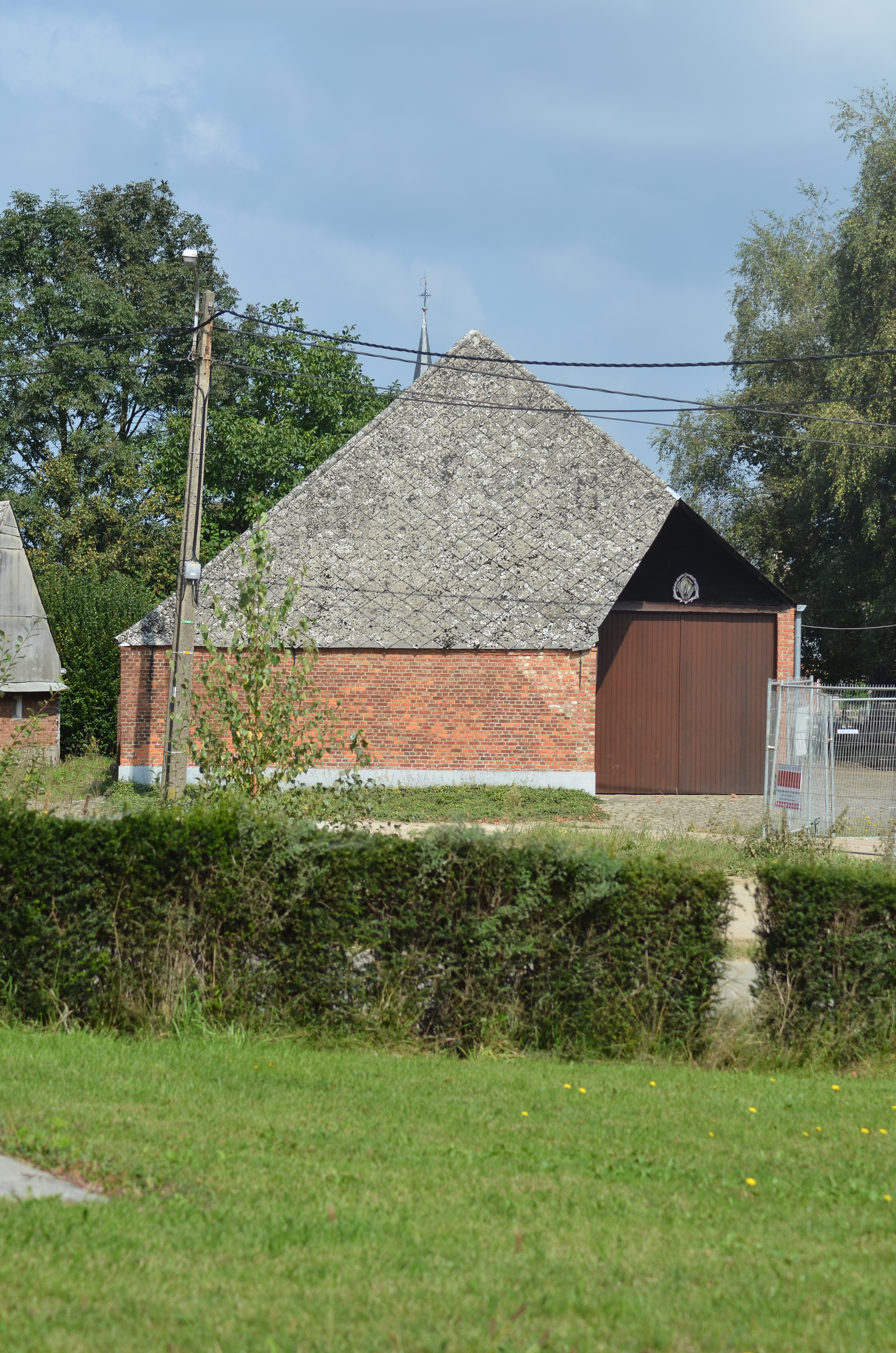 Kempische schuur bij gerenoveerde hoeve